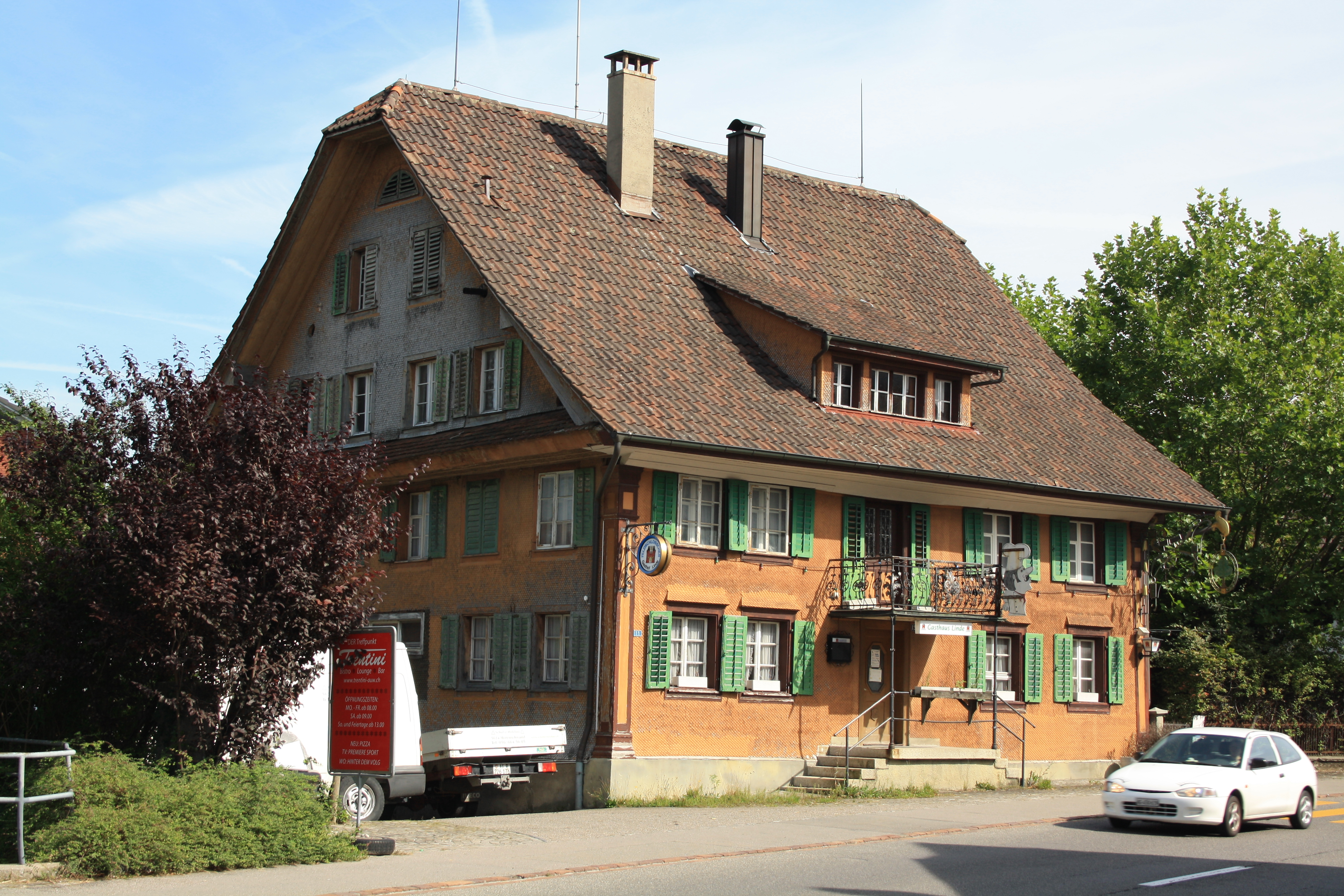 Auw, Kanton Aargau